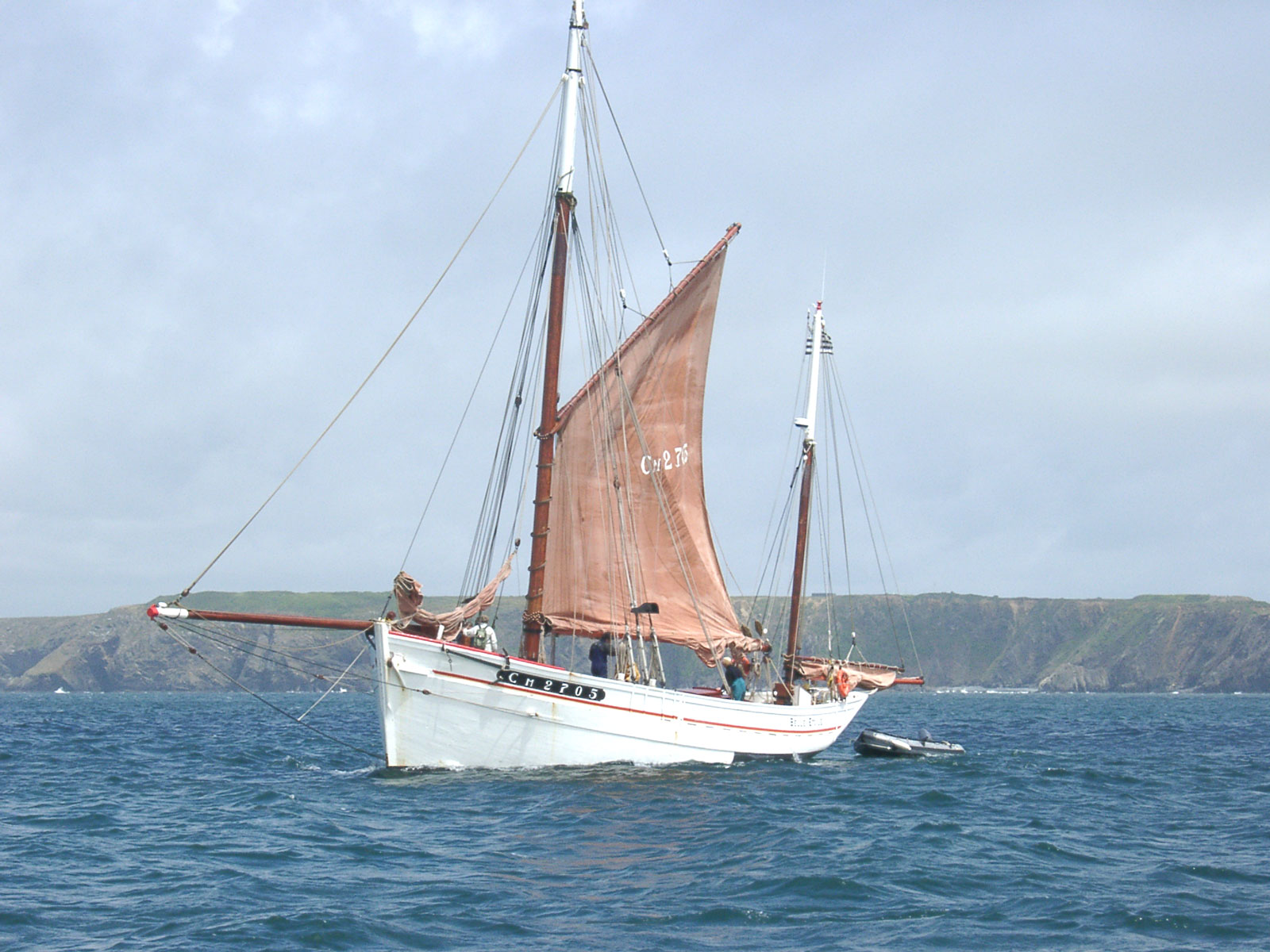 Description :la Belle Etoile au large de Camaret réplique d'un dundee langoustier de Camaret de 18 m Place : au large de Camaret, Bretagne, France Date : 2001 Auteur : Pline Photo personnelle